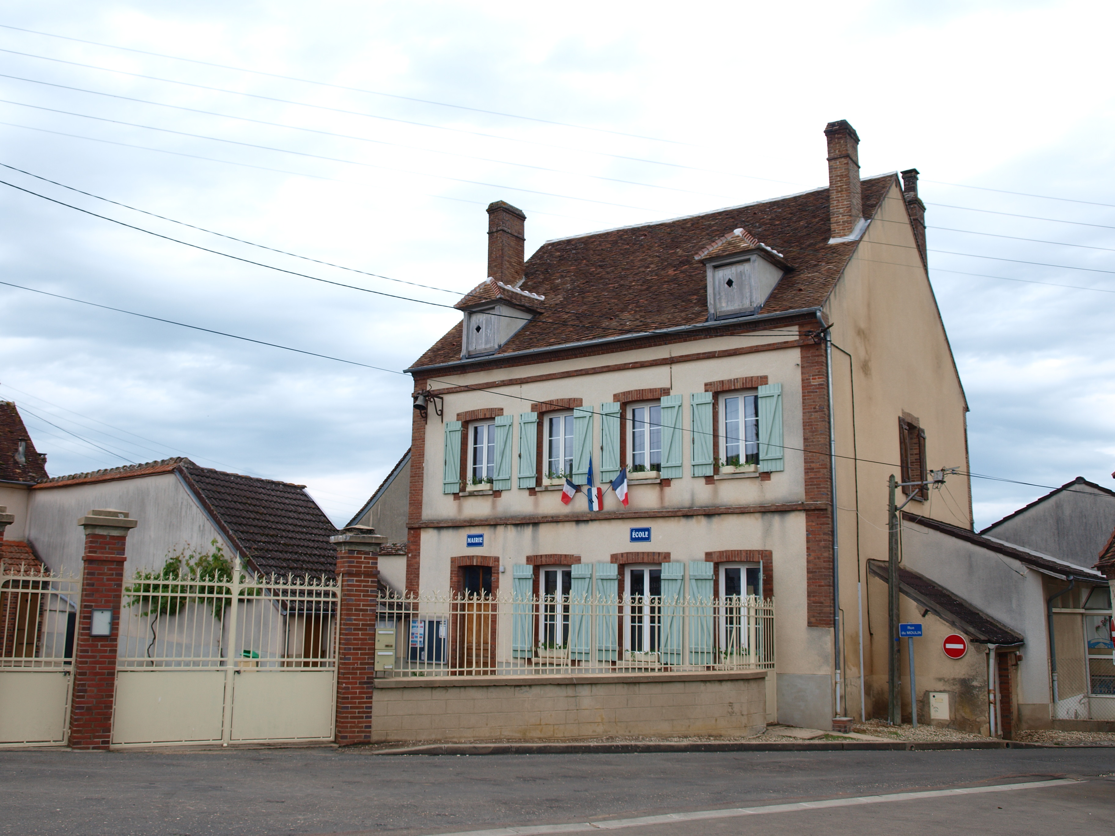 Rousson, dans l'Yonne : mairie